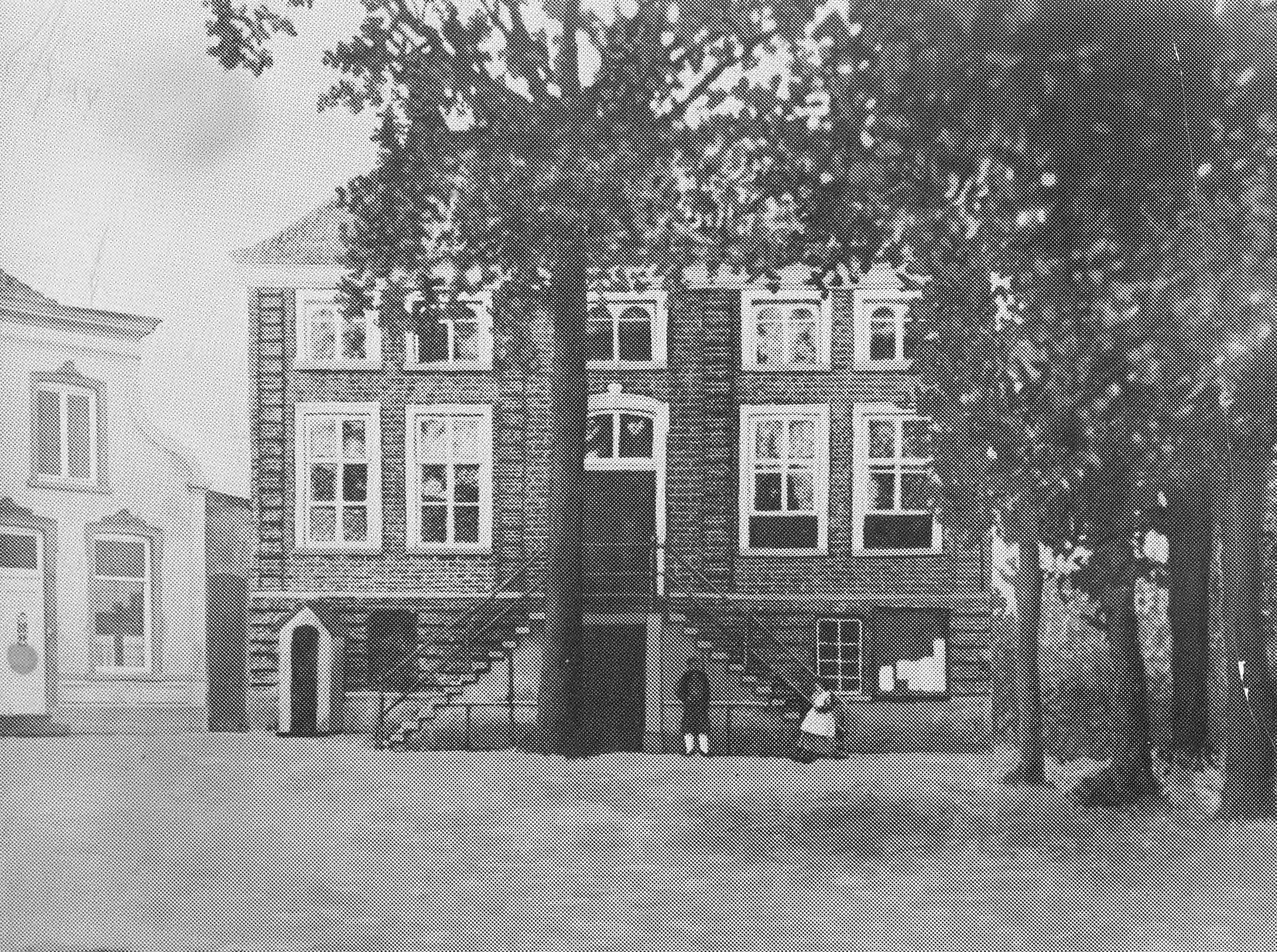 In 1781 werd in de Hoofdstraat het eerste Veghelse raadhuis gebouwd, waar ook de toenmalige boterwaag naartoe werd verplaatst. Aan de Hoofdstraat werd toen ook altijd de wekelijkse botermarkt gehouden op donderdag. In de onderste verdieping van het nieuwe gebouw kreeg de boterwaag een plekje. Dat gebouw werd in 1876 vervangen door een nieuw raadhuis, dat we nu kennen als het oude Raadhuis aan de Markt.